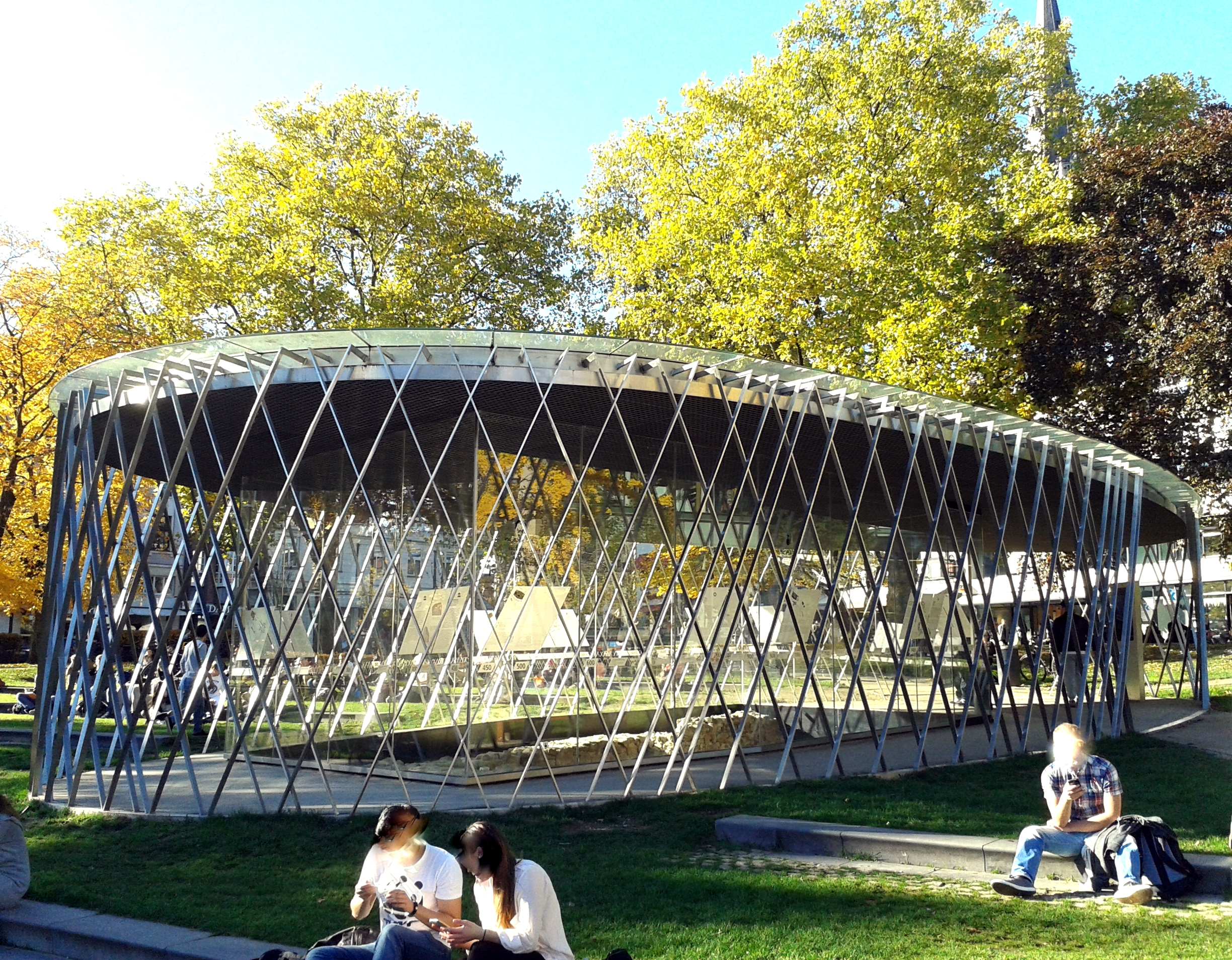 Archäologische Vitrine im Elisengarten Aachen, Gesichter aus Datnschutzgründen unkenntlich gemacht